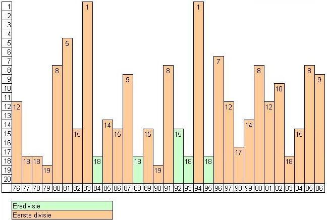 zelfgemaakte tabel.